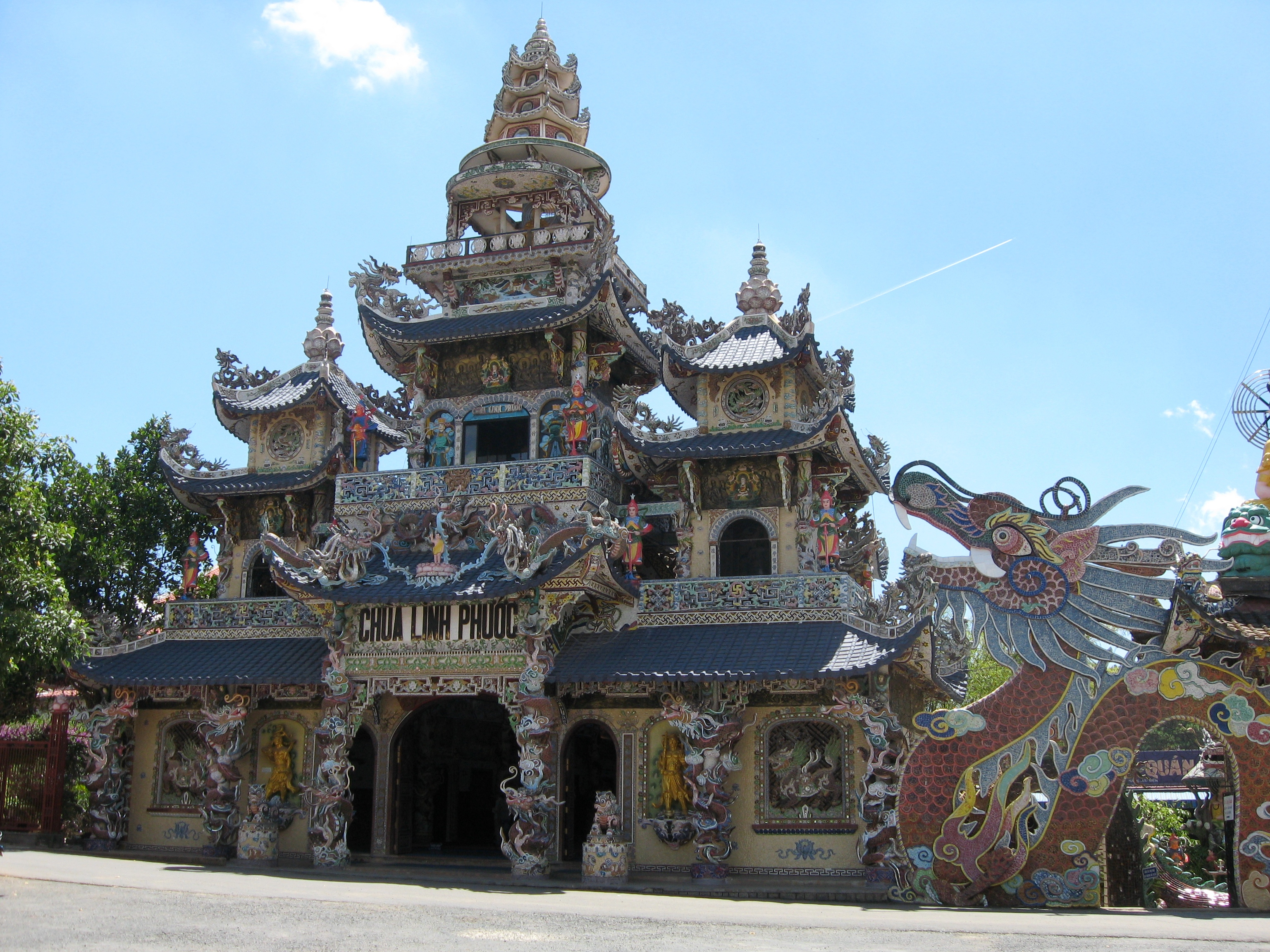 Linh Phuoc Pagoda